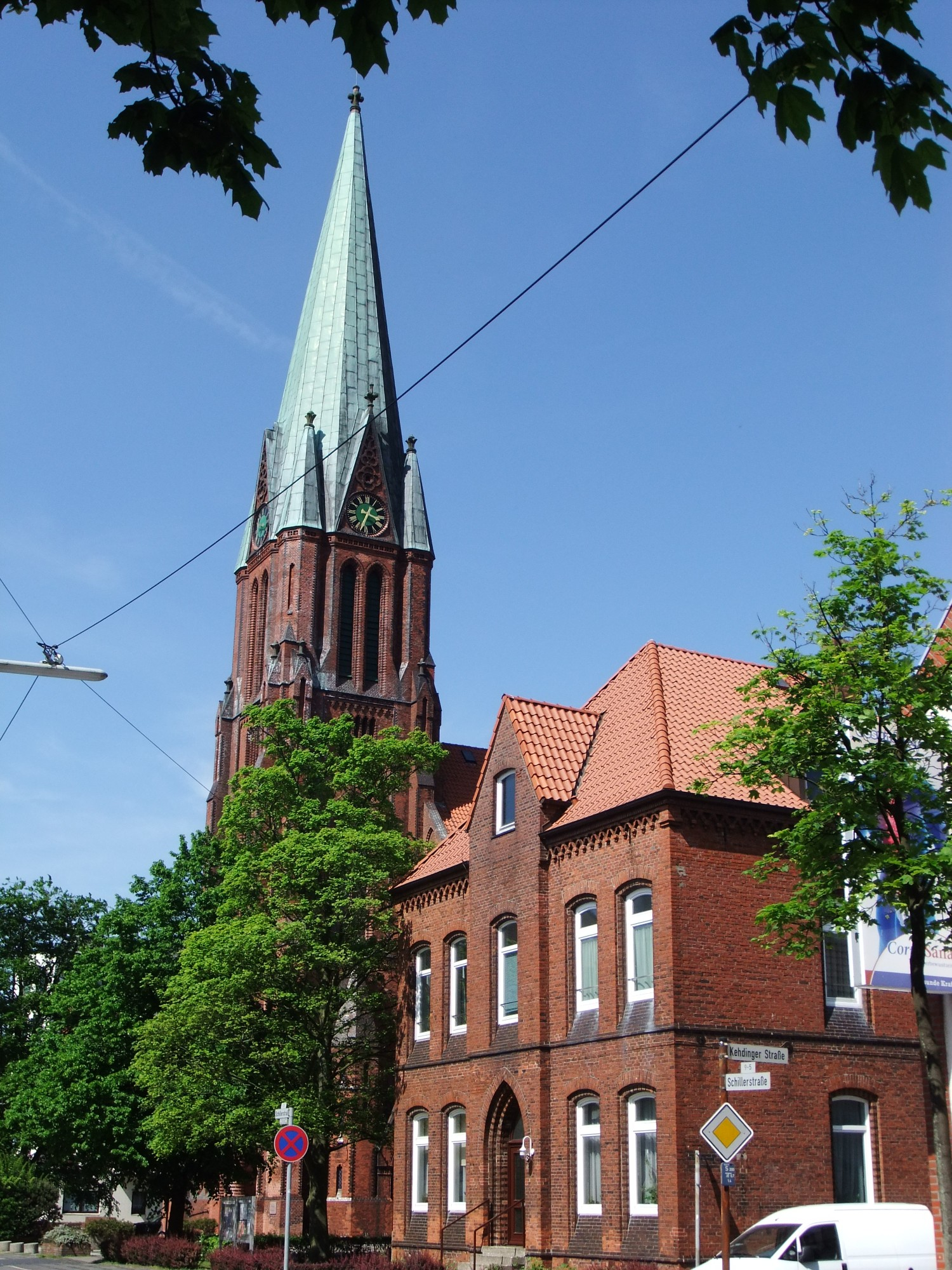 Christuskirche und Altes Pfarrhaus der Christusgemeinde in Bremerhaven, Schillerstraße 1 . Die Gesamtanlage ist ein geschütztes Kulturdenkmal in der Freien Hansestadt Bremen, mit der Nr. 1640 beim Landesamt für Denkmalpflege registriert.